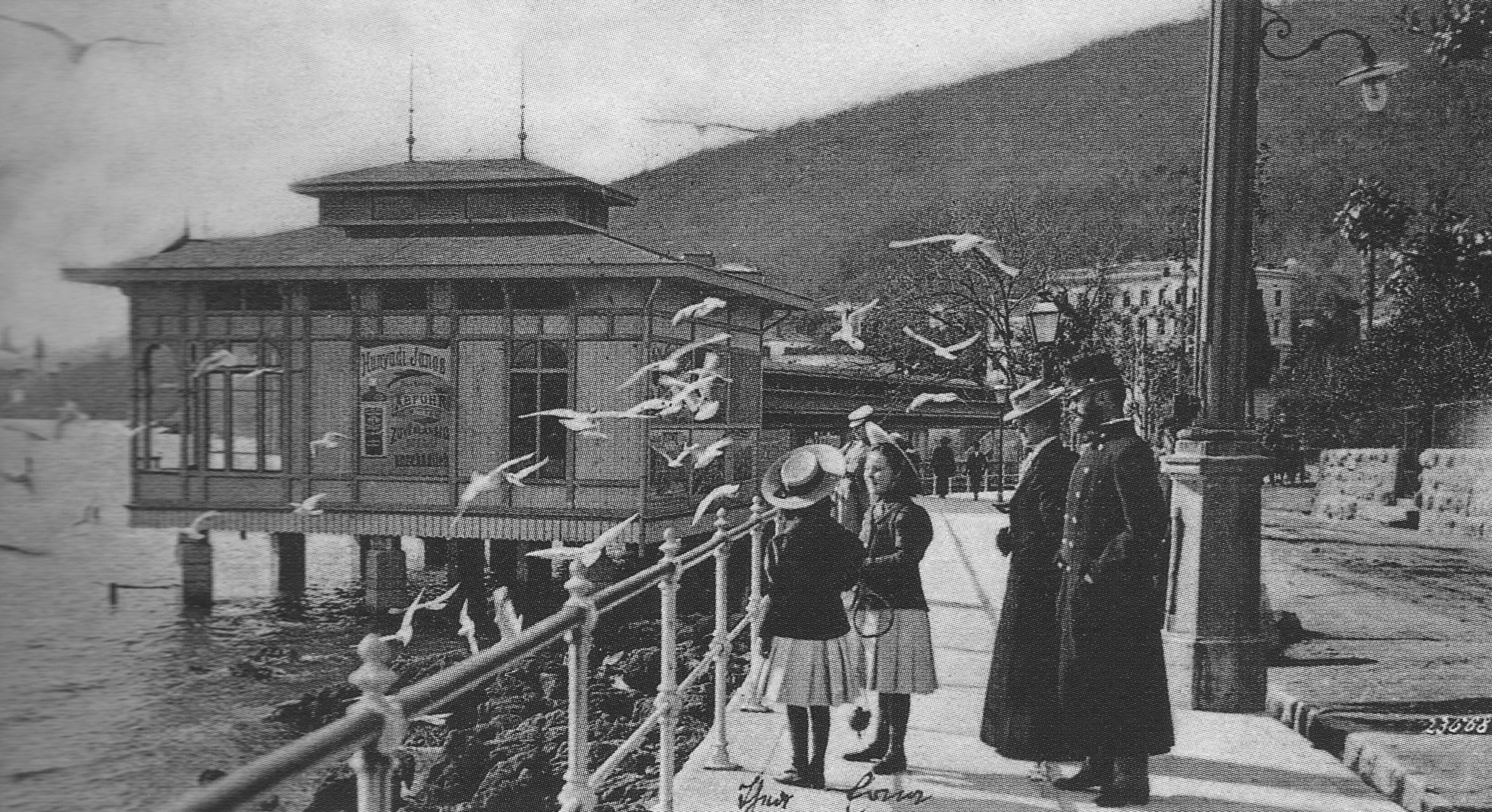 Opatija (Abbazia), Slatina-Promenade